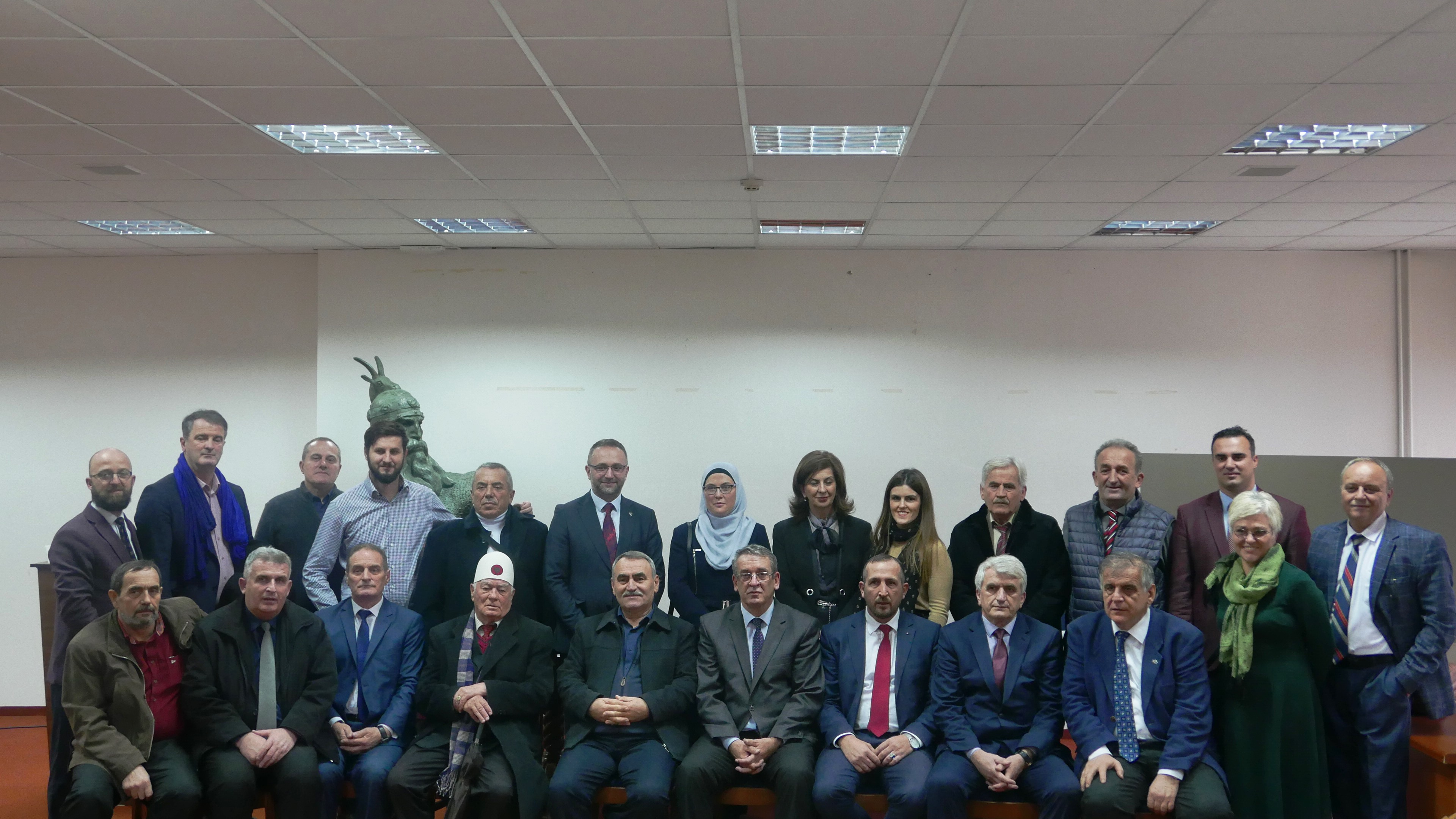 Pjesëmarrësi e Kuvendit të II te shoqatës Kosova për Sanxhakun